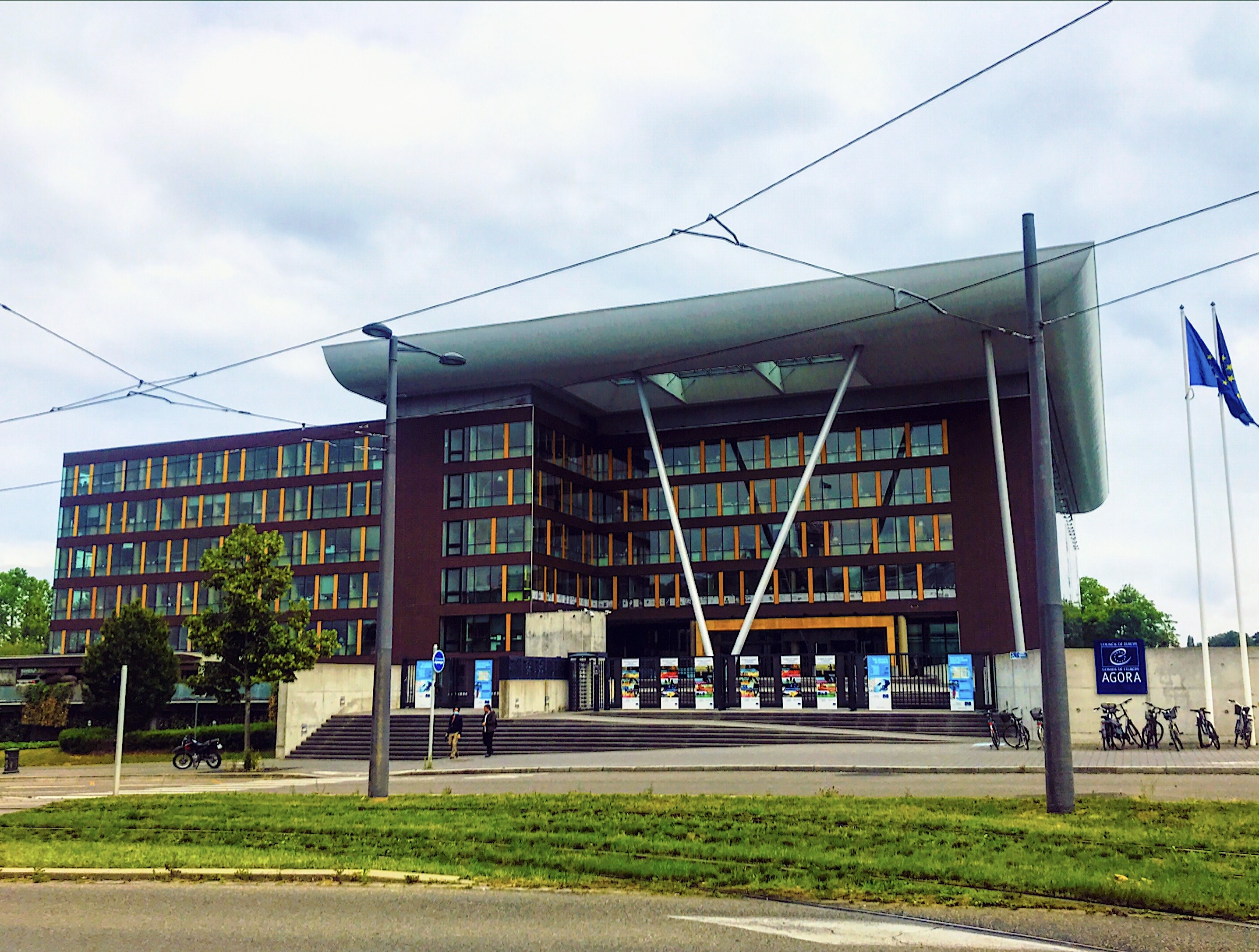 Le Secrétariat du Groupe Pompidou trouve son siège dans le bâtiment de l'Agora - Conseil de l'Europe à Strasbourg, France. C'est un bâtiment du Conseil de l'Europe qui est situé à proximité de la Cour européenne des droits de l'homme et du Palais de l'Europe et borde également le canal de la Marne au Rhin.